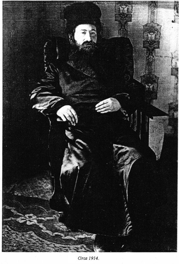 יודל רוזנברג